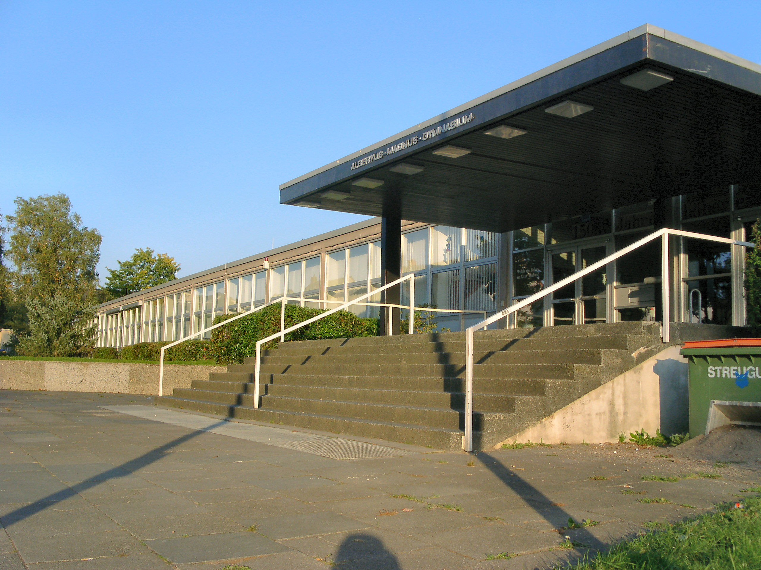 Albertus-Magnus-Gymnasium in Bensberg